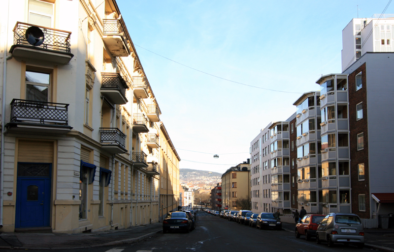 Bjerregårds gate, Oslo. Seen NE.